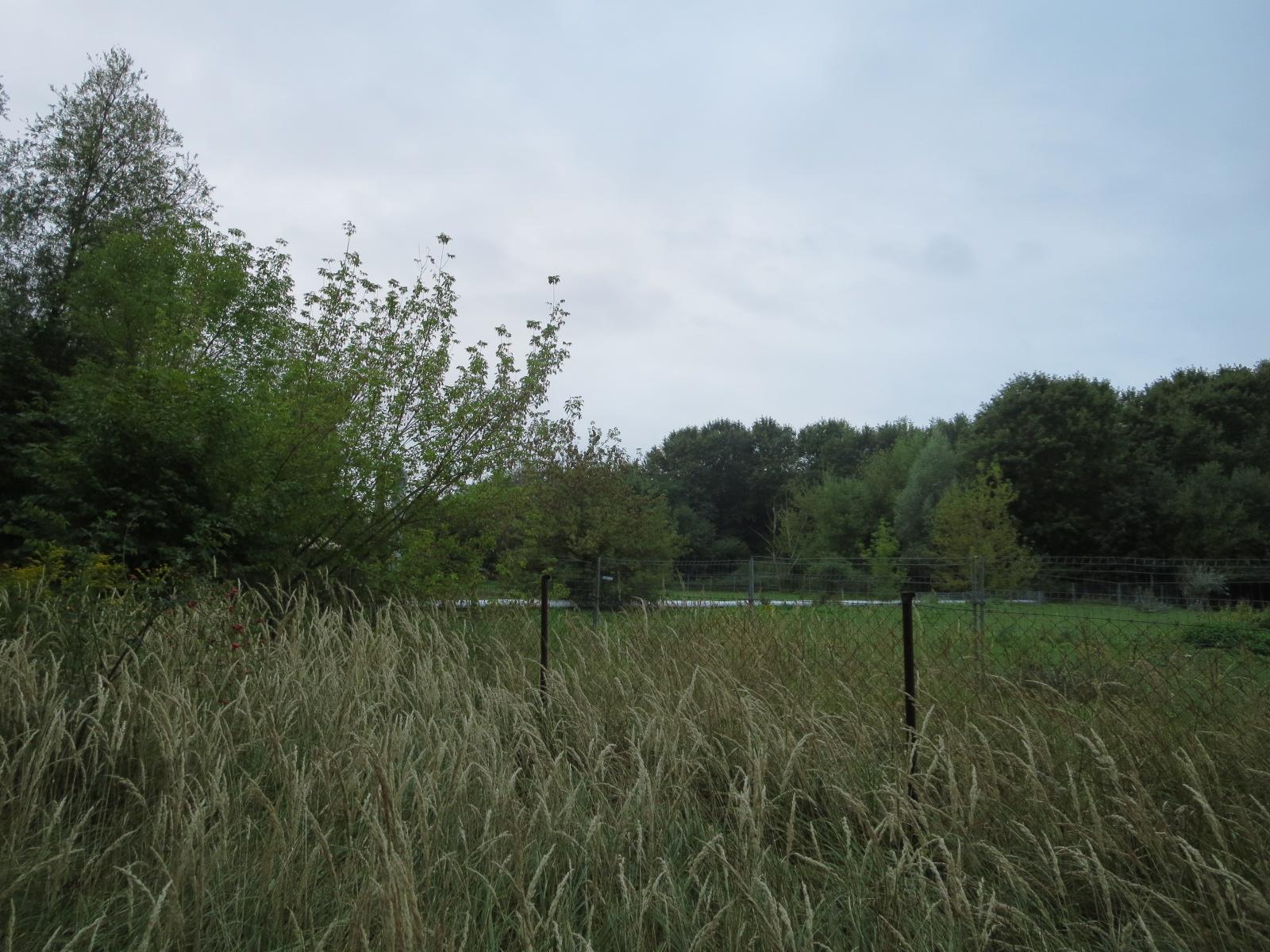 Umzäunte Wiese auf dem Stener Berg